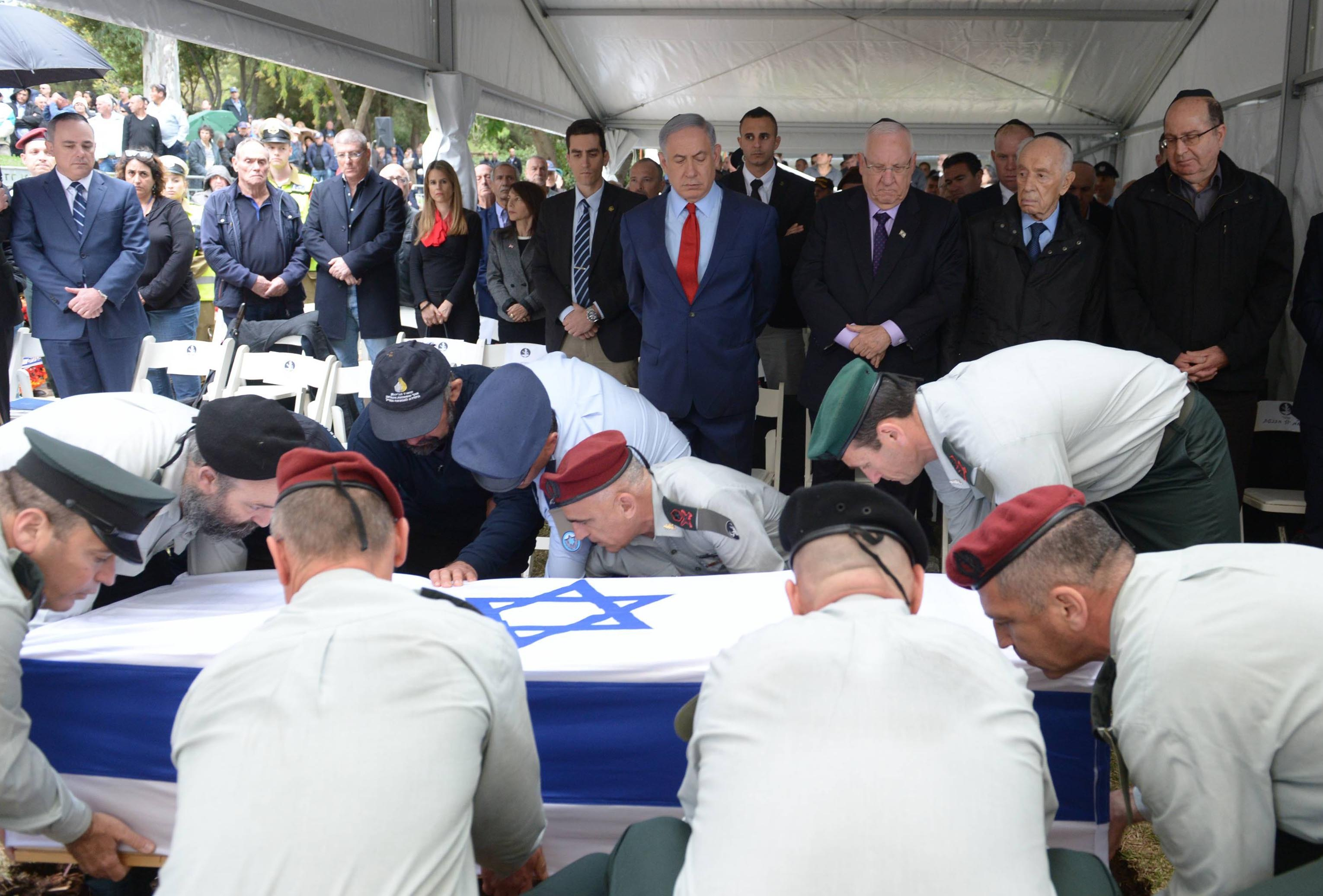 הלווייתו של ראש המוסד לשעבר מאיר דגן. עומדים בחזית התמונה, מימין לשמאל: משה יעלון, שמעון פרס, ראובן ריבלין, בנימין נתניהו.